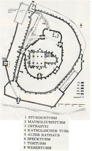 Planul fortificatiei din Biertan